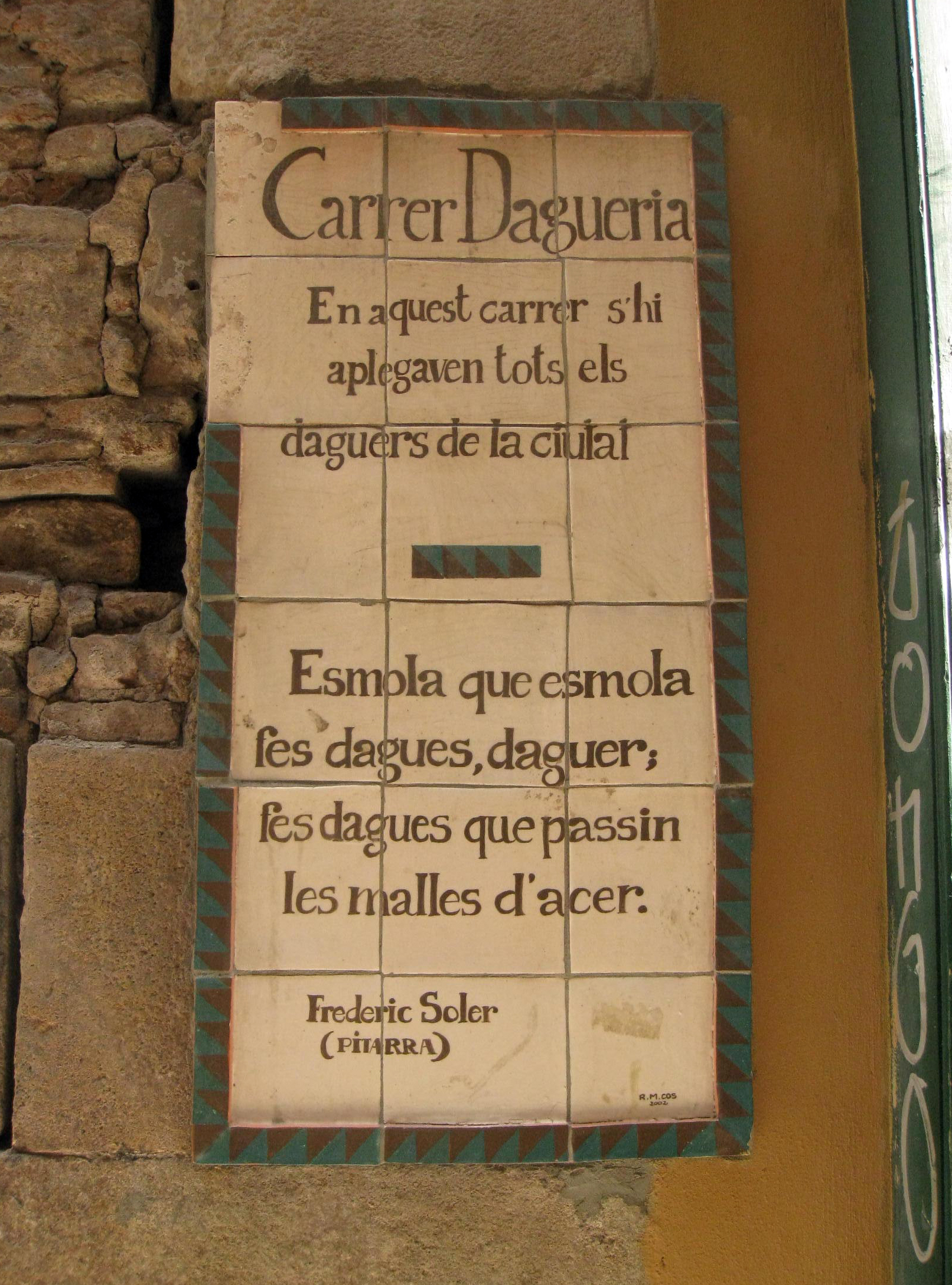 Carrer Dagueria. C. Dagueria, 11 (Barcelona)